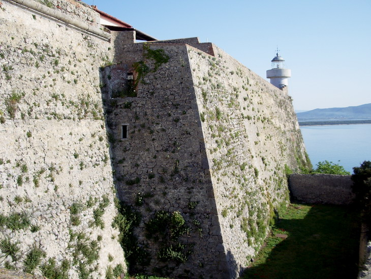 Bastione est Rocca aldobrandesca Porto Ercole